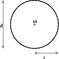 Circle2; cirkel